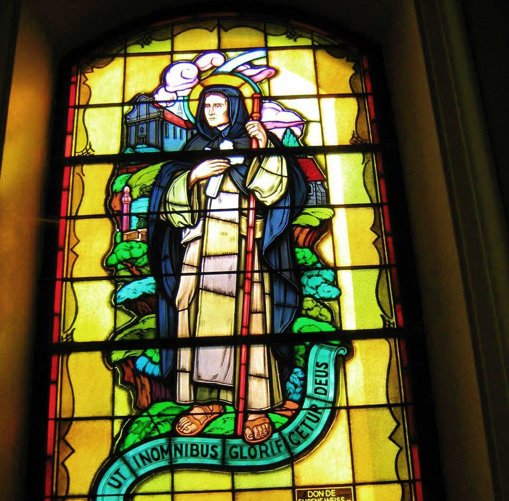 Détail d'un vitrail de la chapelle St Wendelin de Burnhaupe le Bas